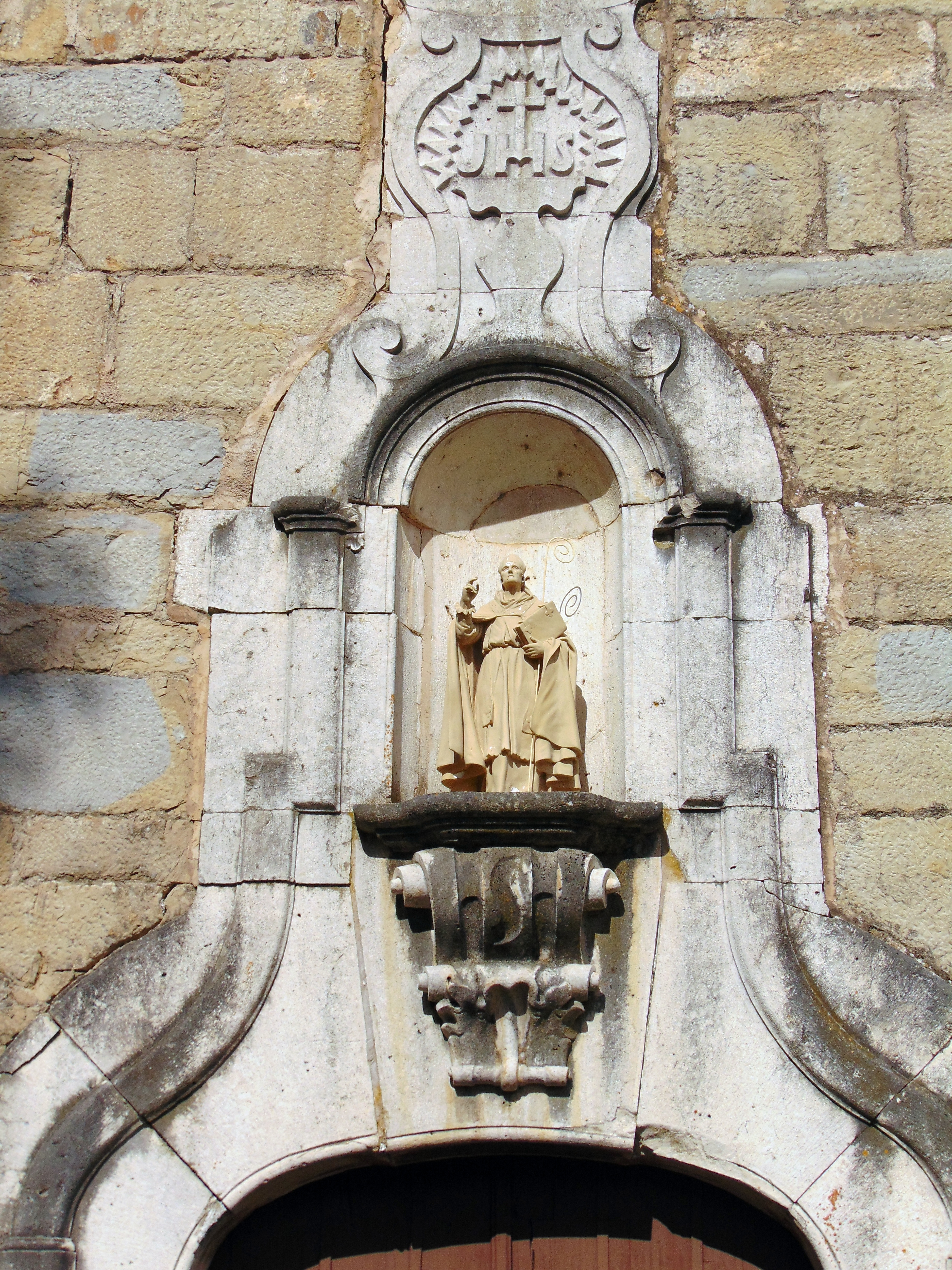 Restes de l'església de Sant Martí de Sales (Sales de Llierca)